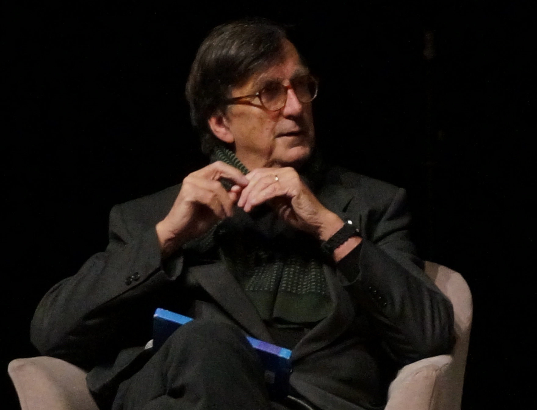 lors de "reims scènes d'Europe", Agent de la géohistoire.